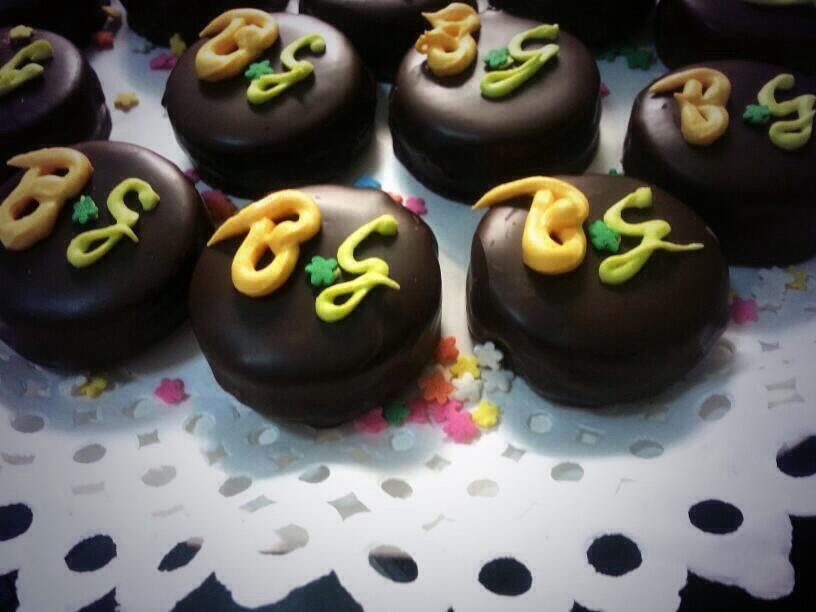 Aljafores chilenos rellenos con manjar y bañados con chocolates.